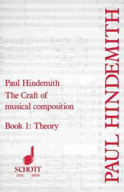 Tapa del libro